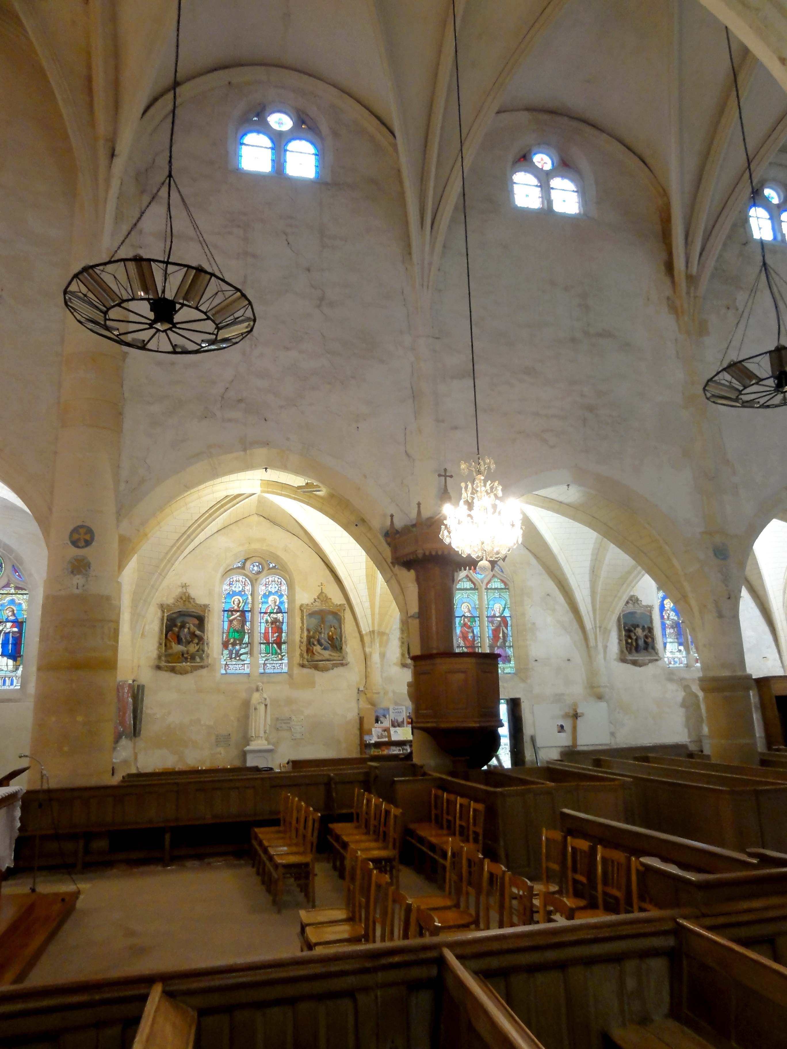 Intérieur de l'église - voir titre.